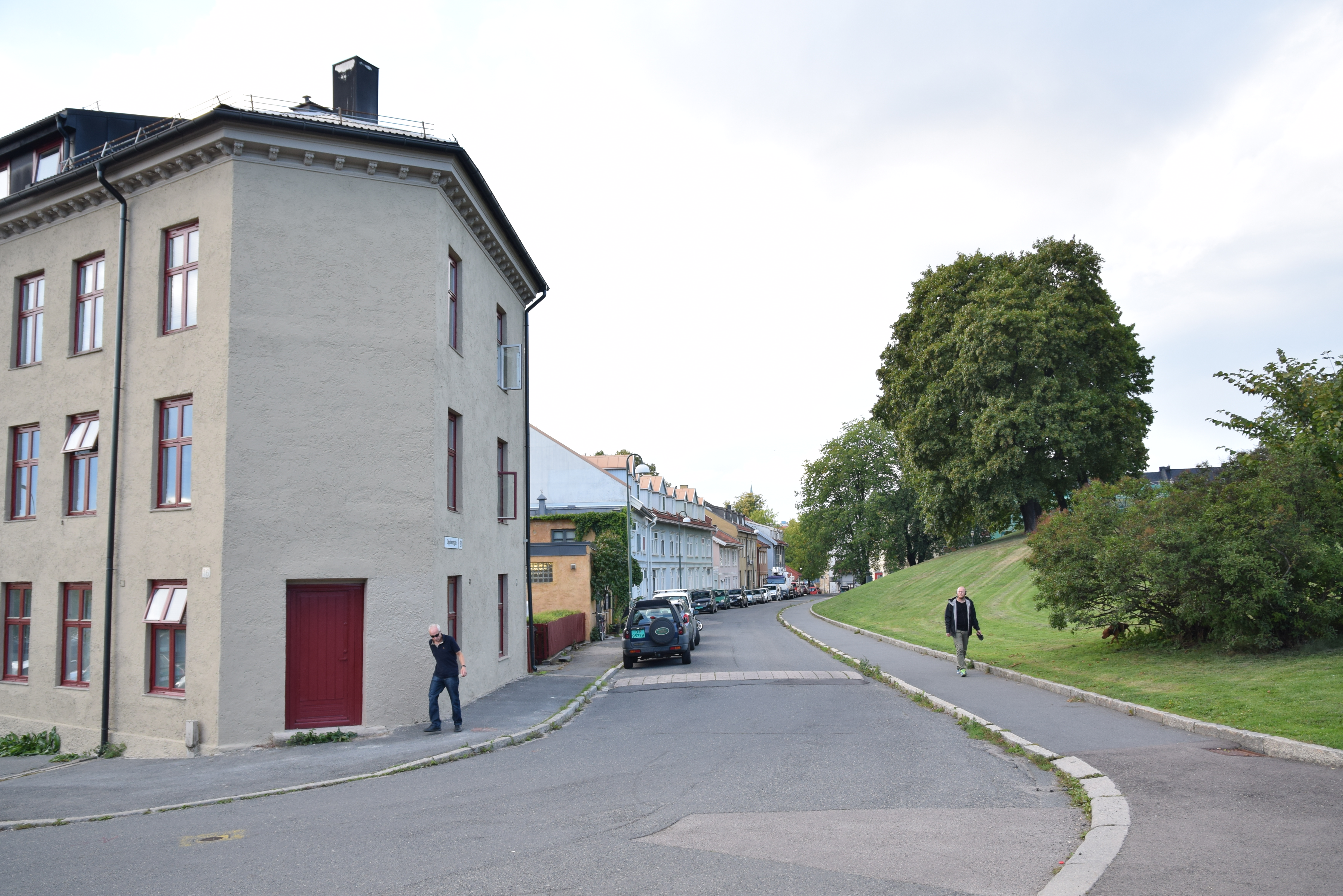 Opplandgata, Vålerenga, sett fra sydenden ved jernbanen. Vålerenga park til høyre